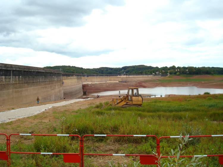 Vidande du bassin de Champagney et entretien du barrage